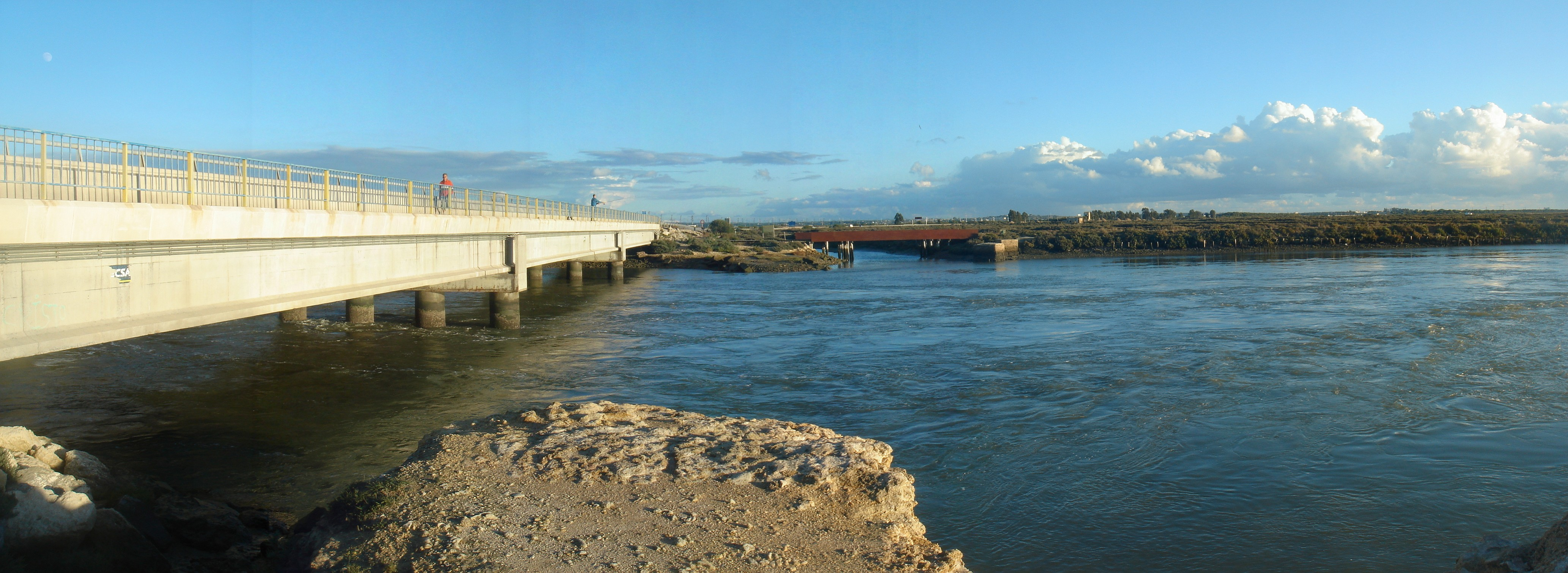 Vista del Río San Pedro desde la antigua carretera Nacional IV, donde está la Venta "El Macka". Ahí se va a instalar lo que queda del puente antiguo de hierro que usaba el ferrocarril, para poder asceder al Parque Natural de la Algaida.